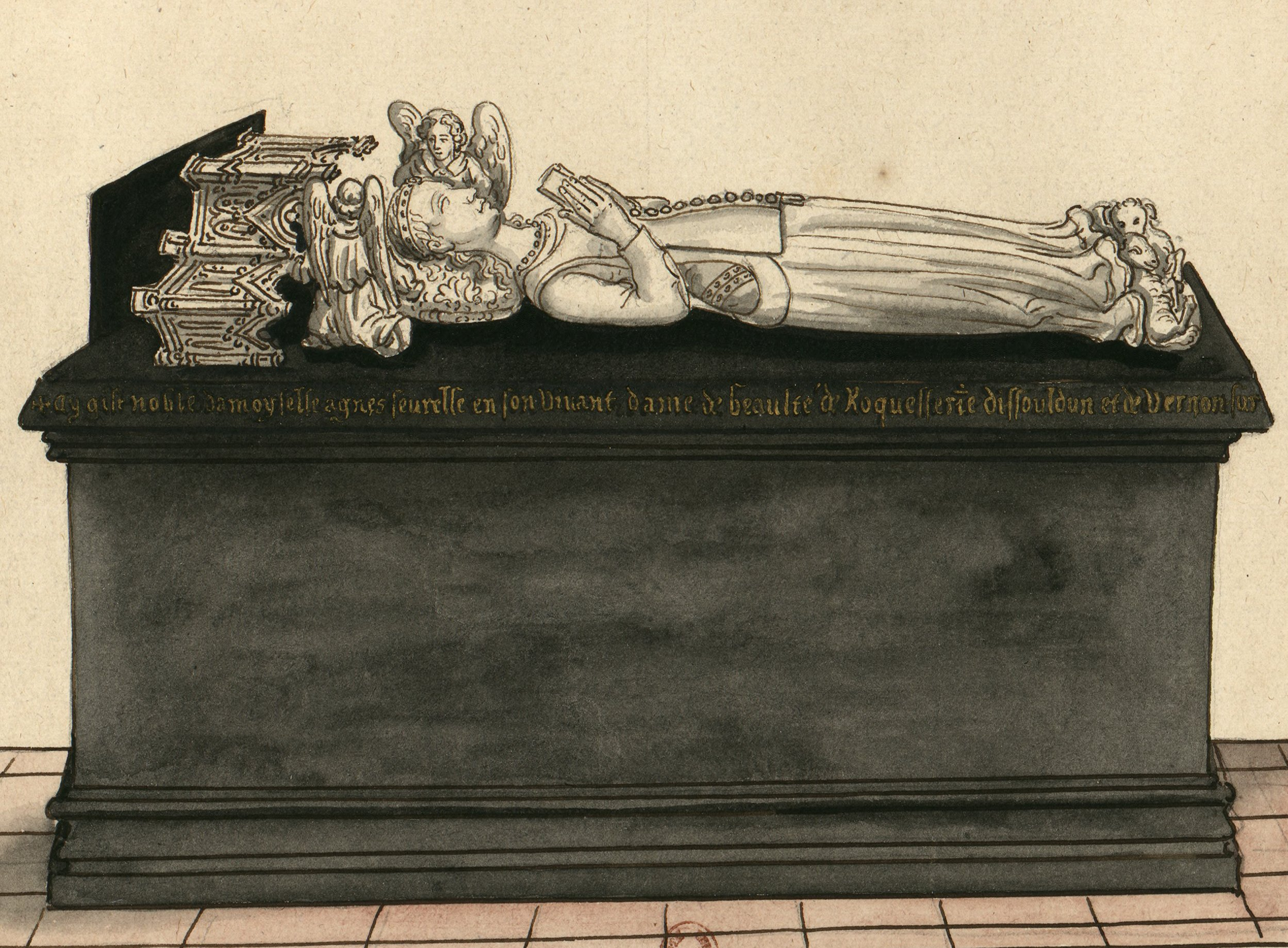 Agnès Sorel